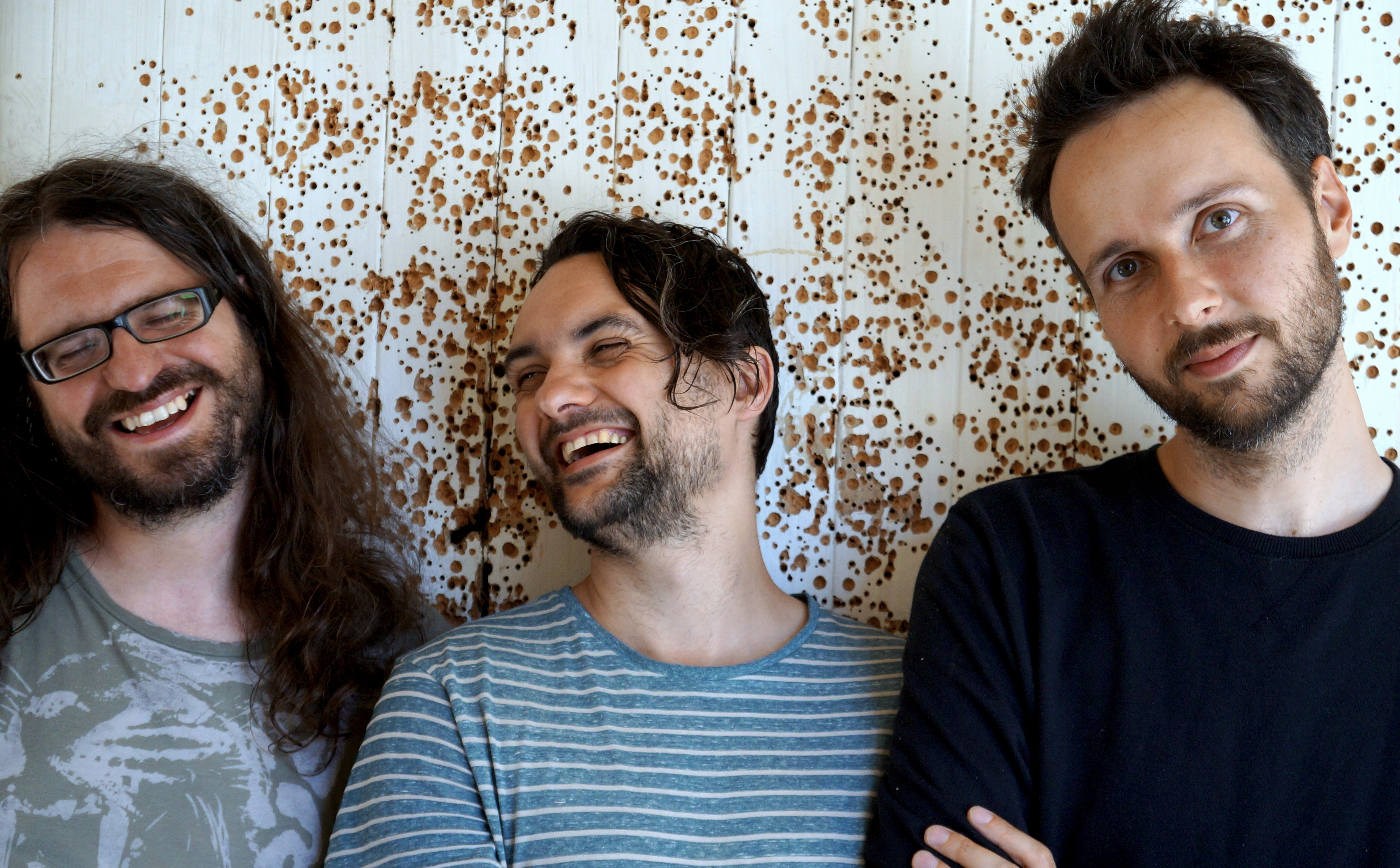 Květy